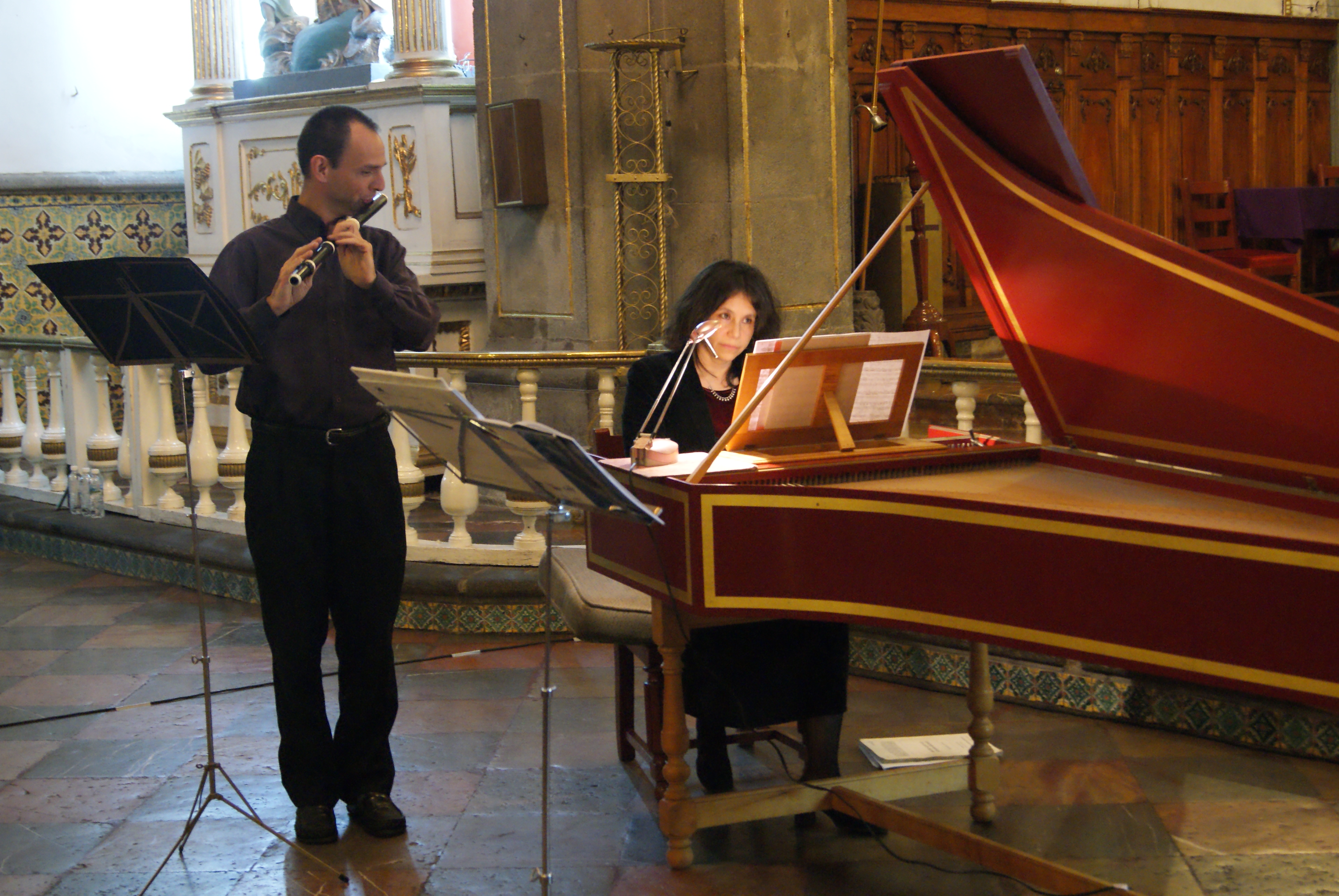 Ensamble Clérambault en el Festival Pasión, en el Templo de Nuestra Señora del Carmen, Puebla, Pue. 2010. El ensamble está compuesto por la clavecinista mexicana Norma García y el flautista francés Vincent Touzet.